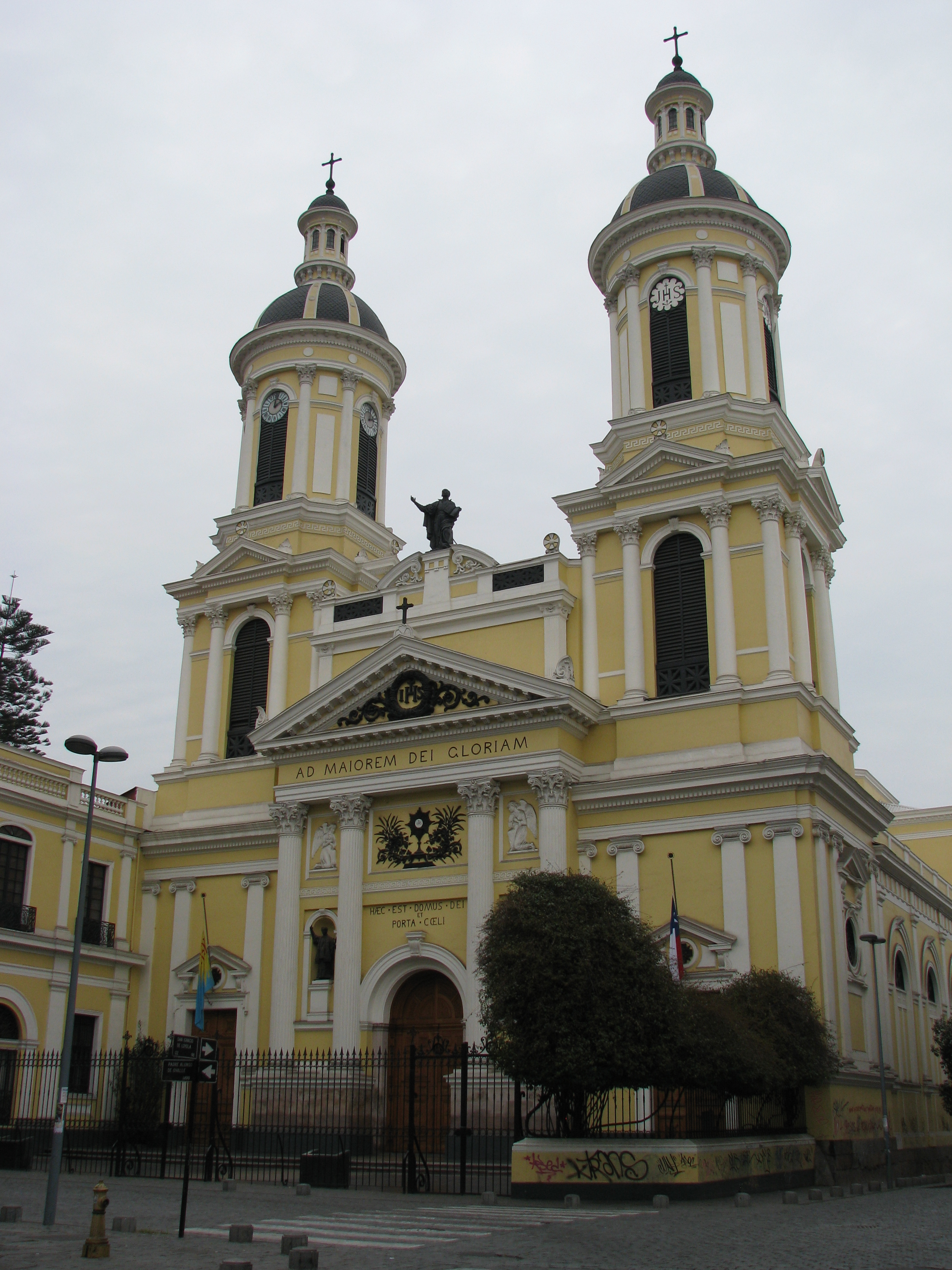 Iglesia de San Ignacio This is a photo of a national monument in Chile: 504